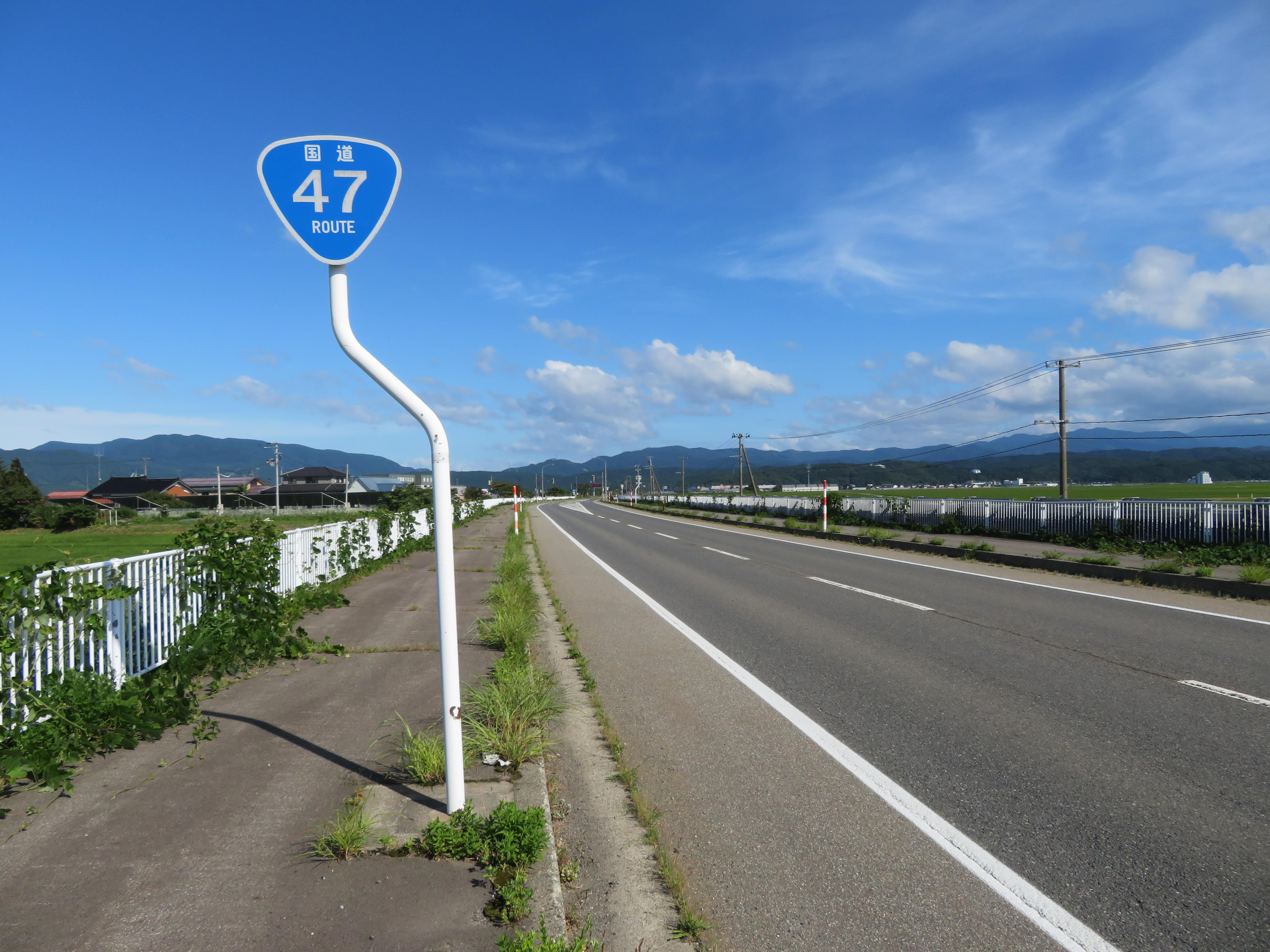 国道47号線山形県東田川郡庄内町古関付近（新庄方面を撮影） Canon PowerShot SX720 HS